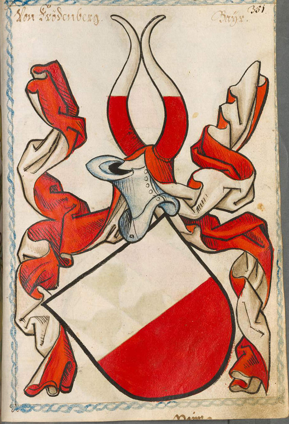 Scheibler'sches Wappenbuch , älterer Teil; Seite 351 Von Frödenberg Bayr